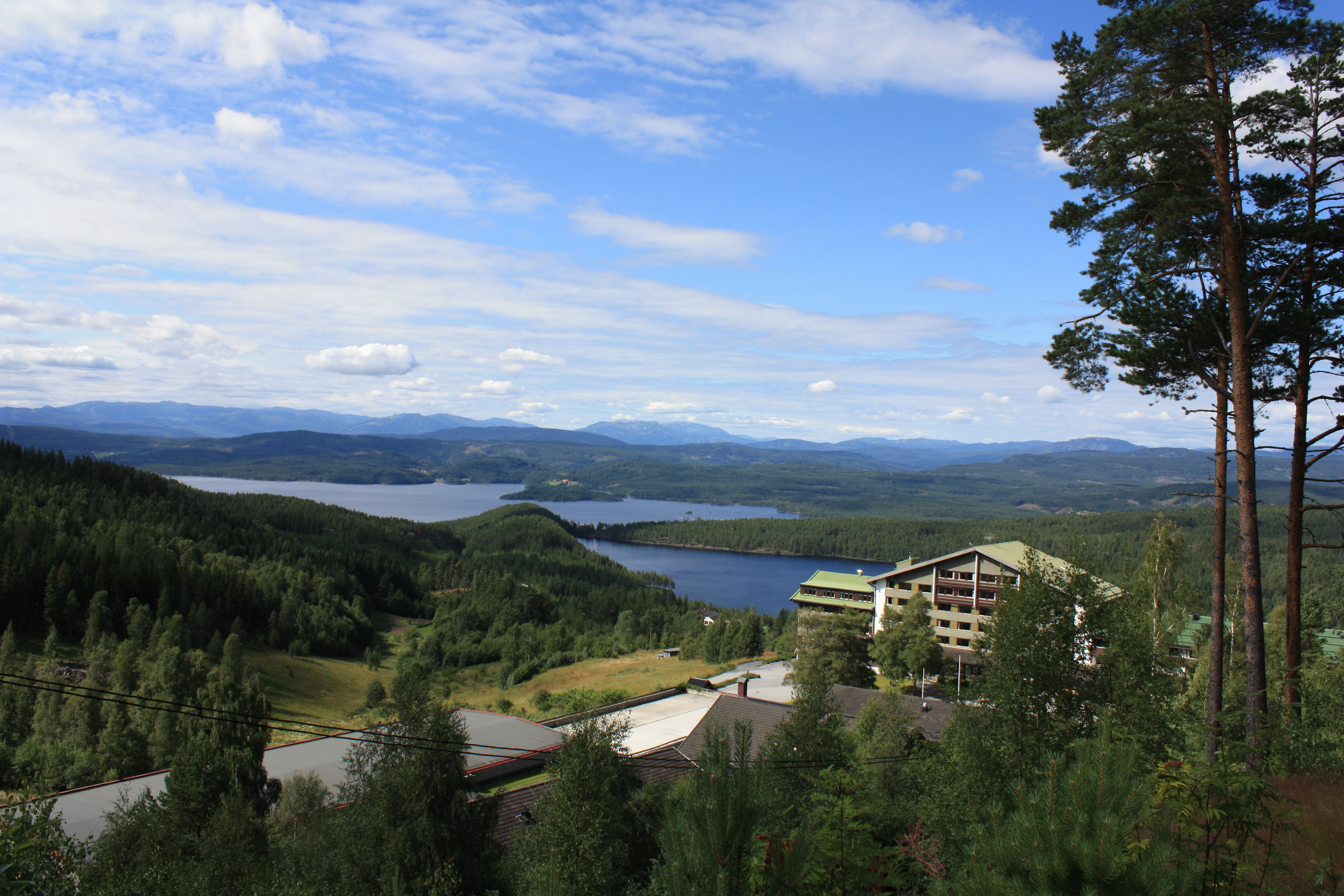 Utsikt fra riksvei 37 mot Bolkesjø hotell, Bolkesjø og Follsjø (i bakgrunnen).